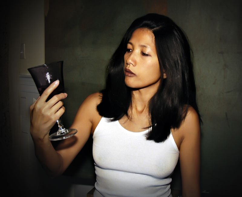 Frau mit Glas in weißem Top